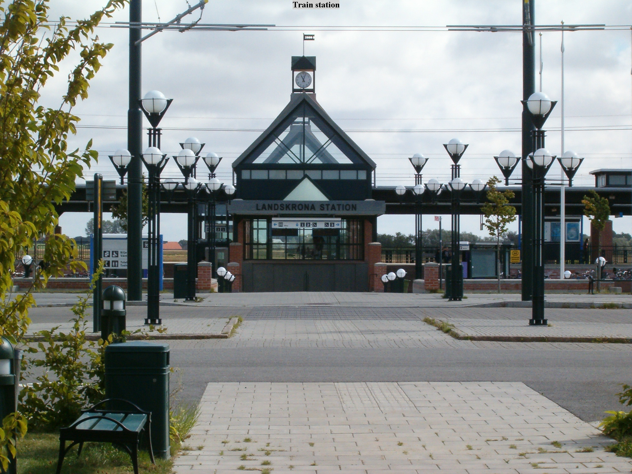 Landskrona Station,Sweden